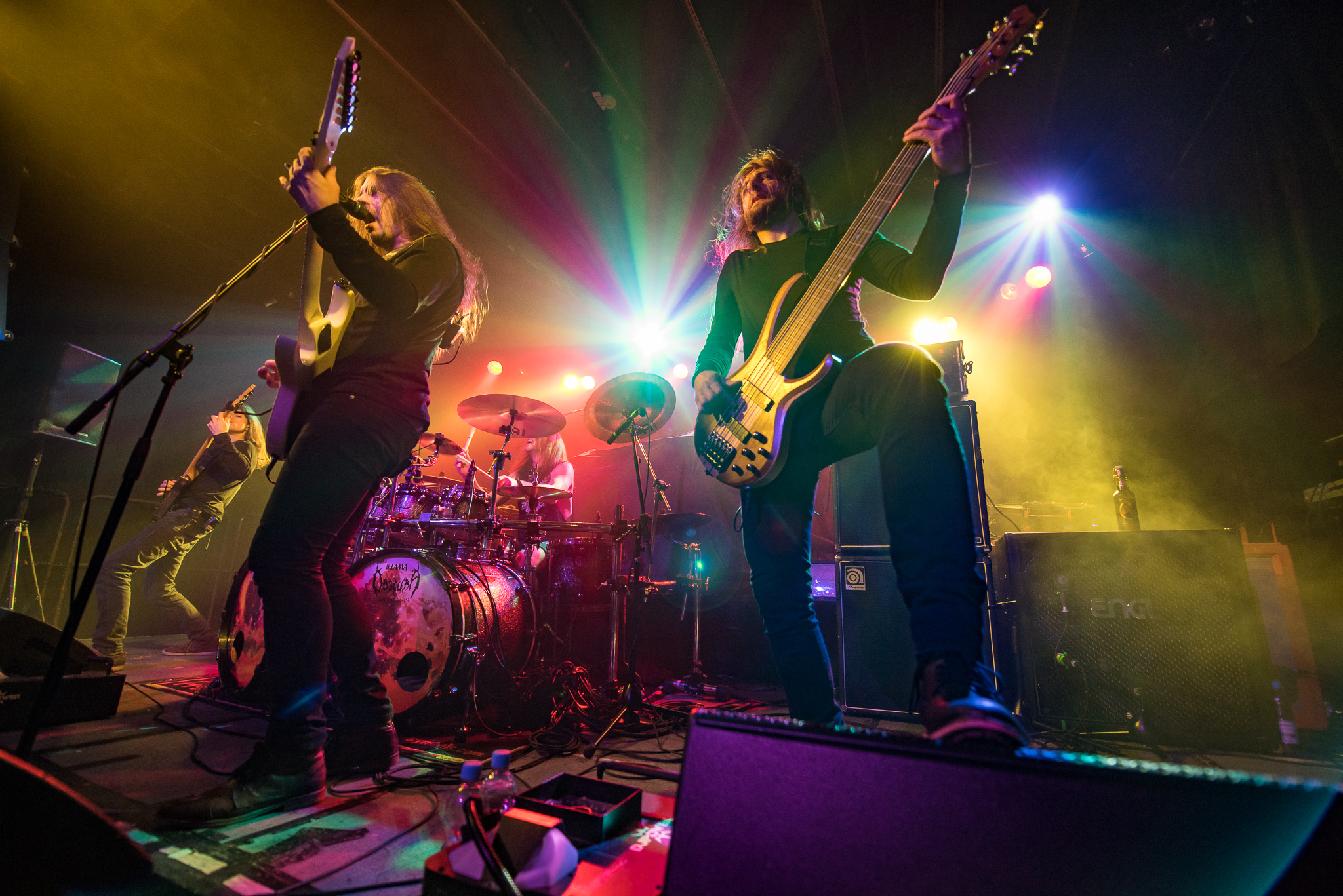 Concertbüro Franken,Der Hirsch,Konzert,Linus Klausenitzer,Livekonzert,Livemusik,Obscura,Rafael Trujillo,Sebastian Lanser,Steffen Kummerer